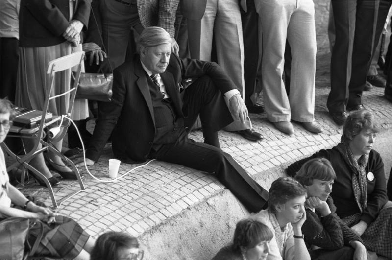 SPD-Parteitag in der Oympiahalle in München